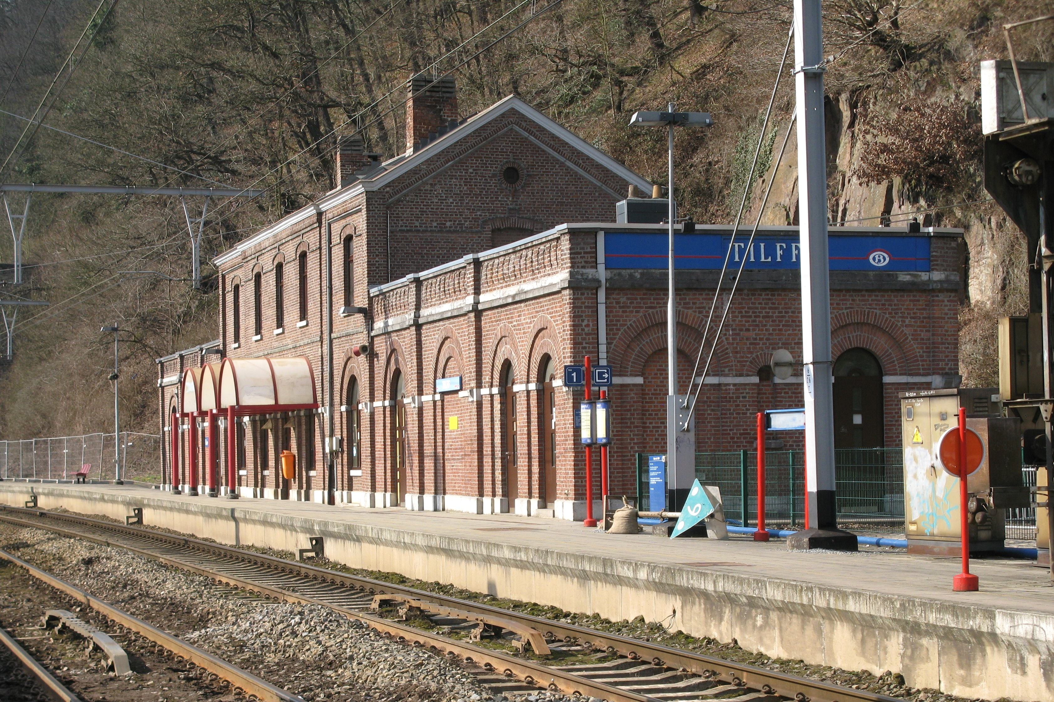 D'Gare vun Tilff am Mäerz 2010